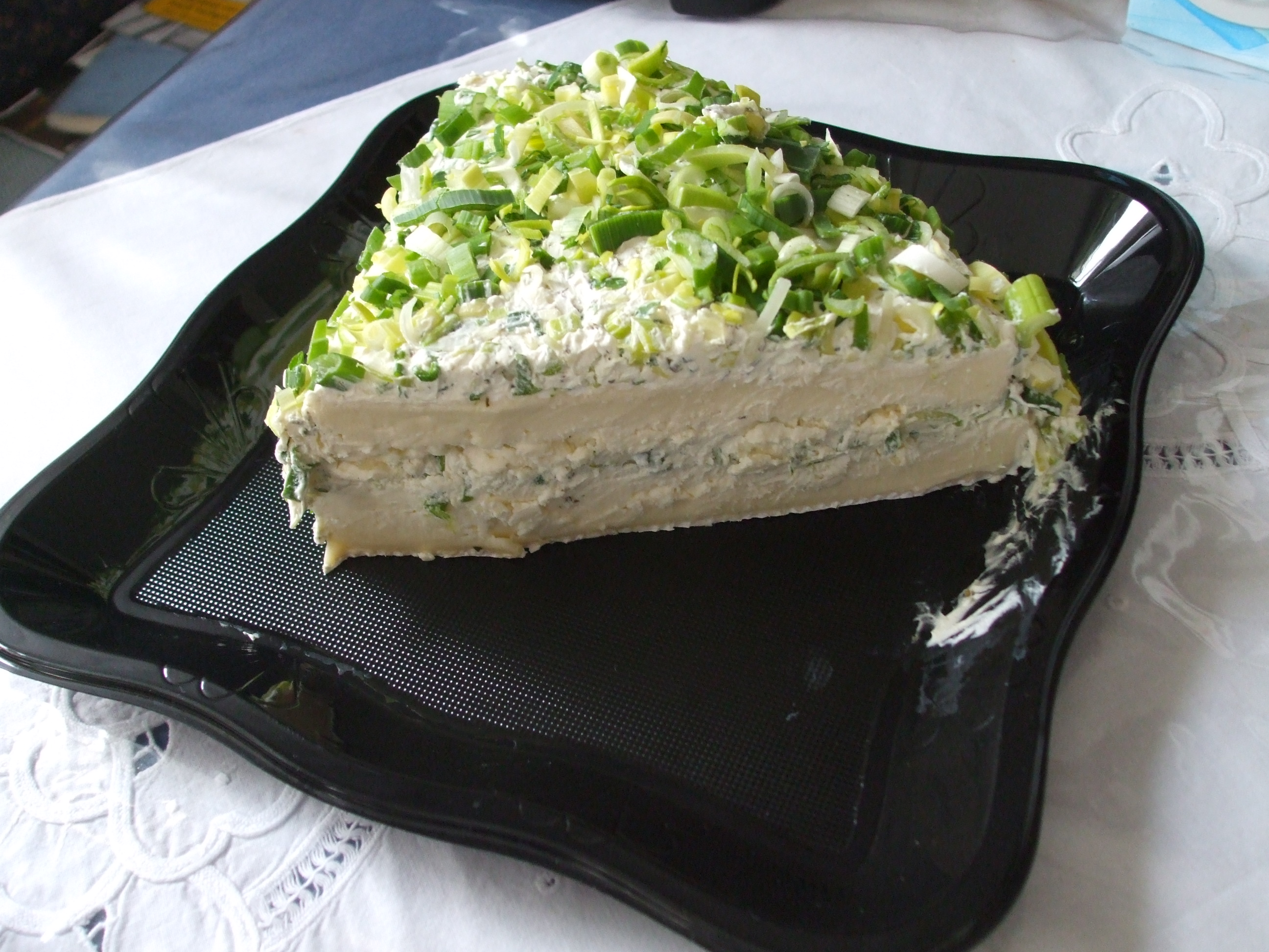 Lauchtorte aus 2 großen Scheiben Camenbert, +Streichkäse (Philidelphia Kräter) +Lauchfüllung und Deckschicht bestreut mit Lauch- und Frühlingszwiebeln.